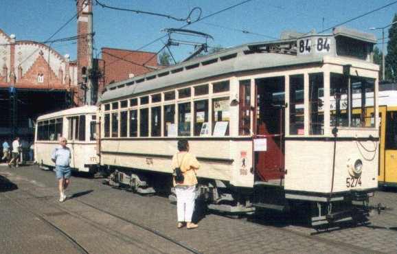 Berliner Strassenbahn Typ TD von 1912